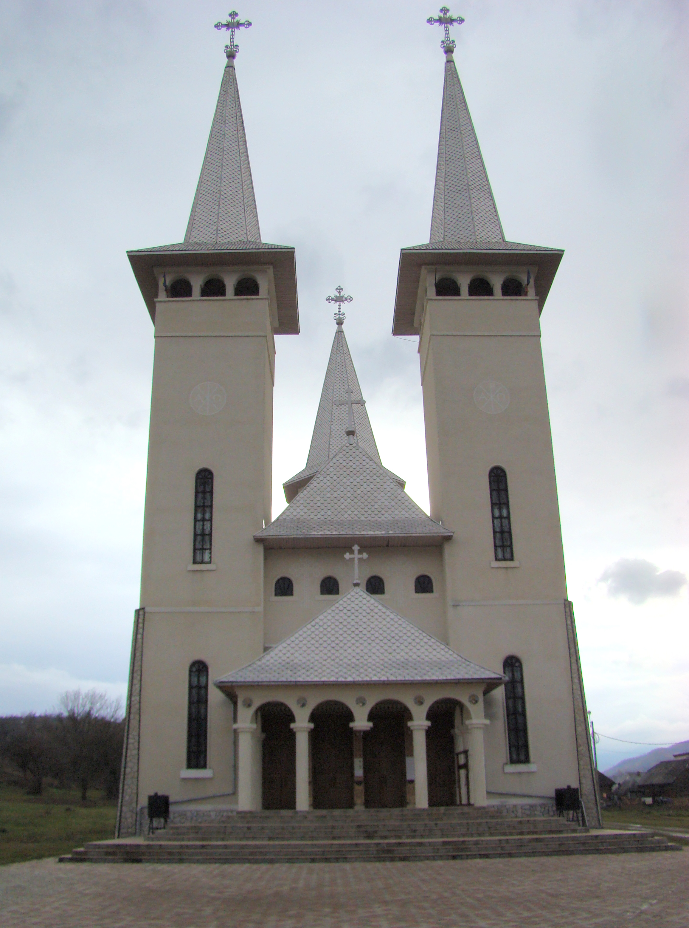 Biserica ortodoxă de zid „Sfânta Treime” din Șieu, Maramureș